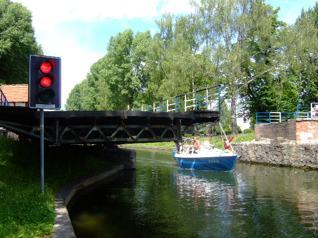 Most obrotowy i kanał w Giżycku